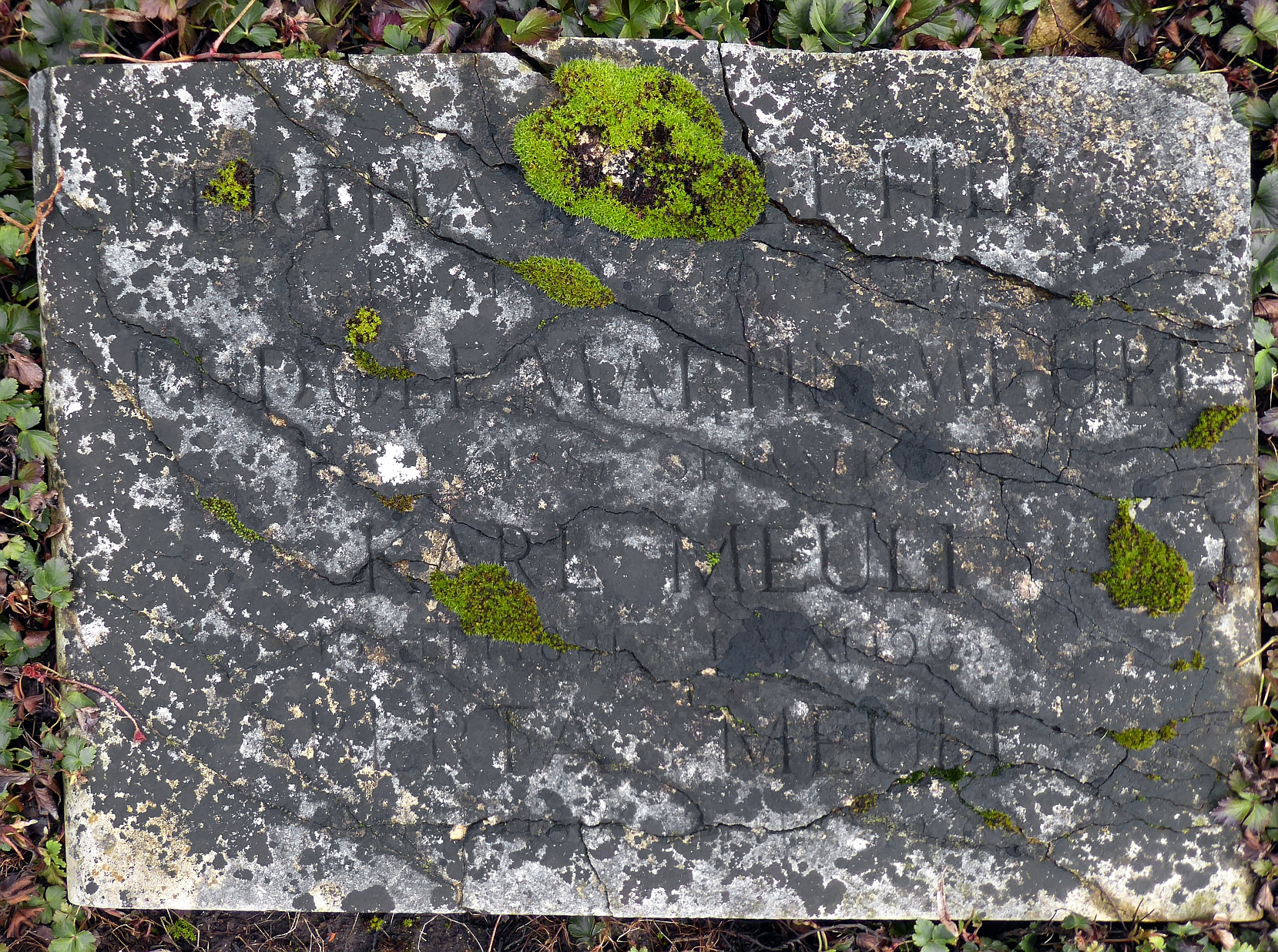 Karl Meuli (1891–1968), Altphilologe, o. Prof. für klass. Altertumswissenschaft mit besonderer Berücksichtigung der antiken Volkskunde. Familiengrab auf dem Friedhof Hörnli, Riehen, Basel-Stadt